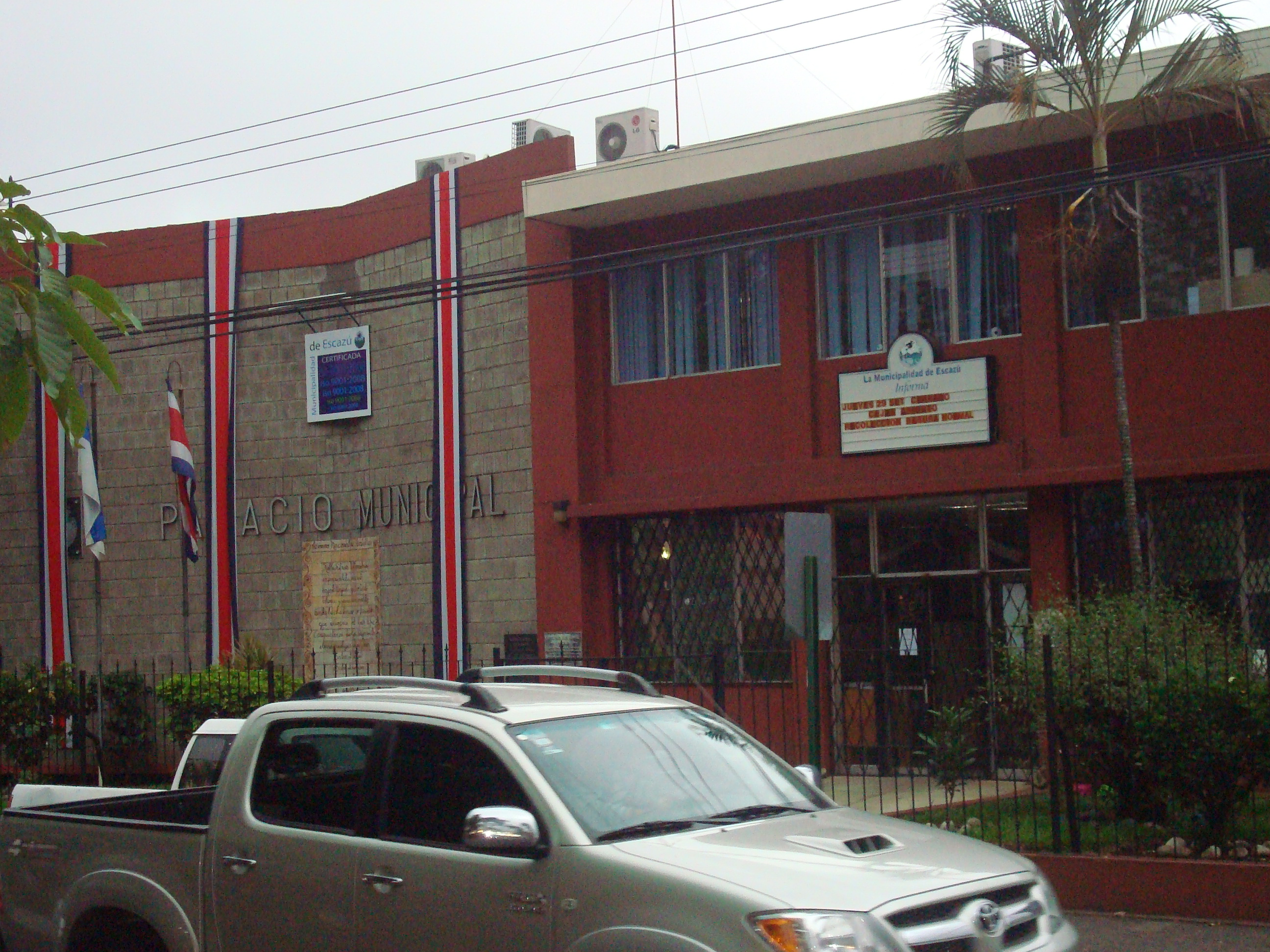 Palacio Municipal de Escazú, Costa Rica.